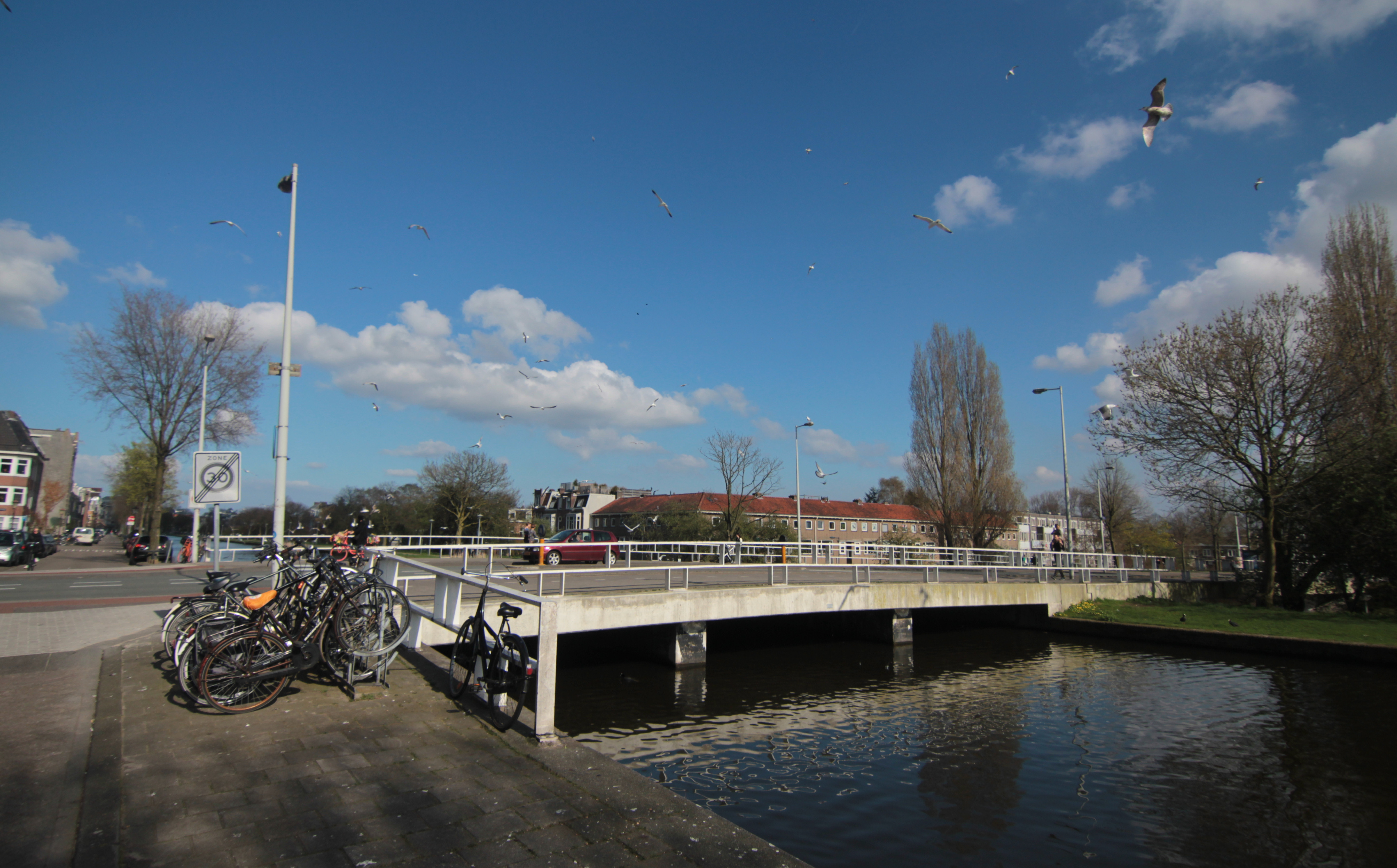 Kaap de goedehoopbrug (brug nr 256) in Amsterdam-Oost